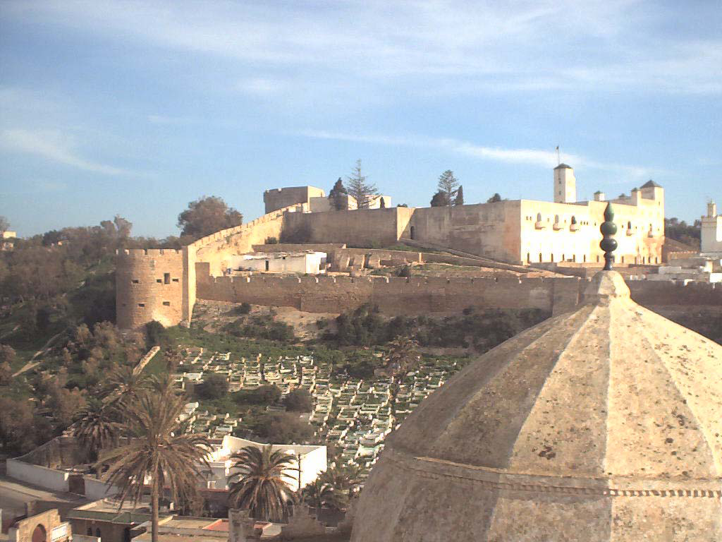 dar sultan à safi (monument)